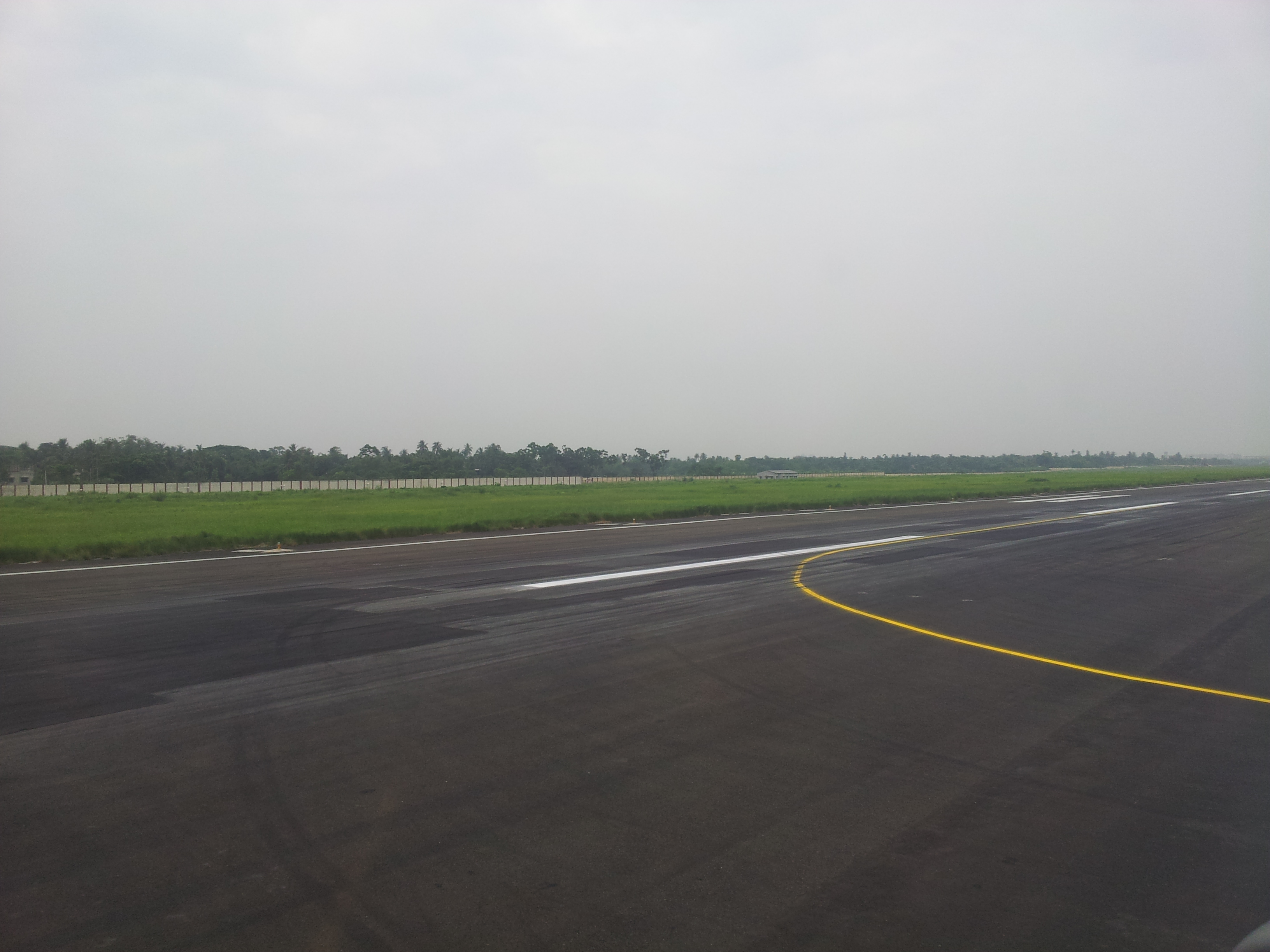 Snap from Netaji Subhash Chandra Bose International Airport, Kolkata, India